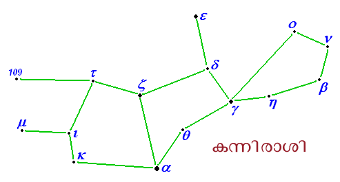 കന്നി രാശി, ഗ്നു അനുമതിപ്രകാരം ഇംഗ്ലീഷ് വിക്കിപീഡിയയിലെ ചിത്രം തിരുത്തിയത്